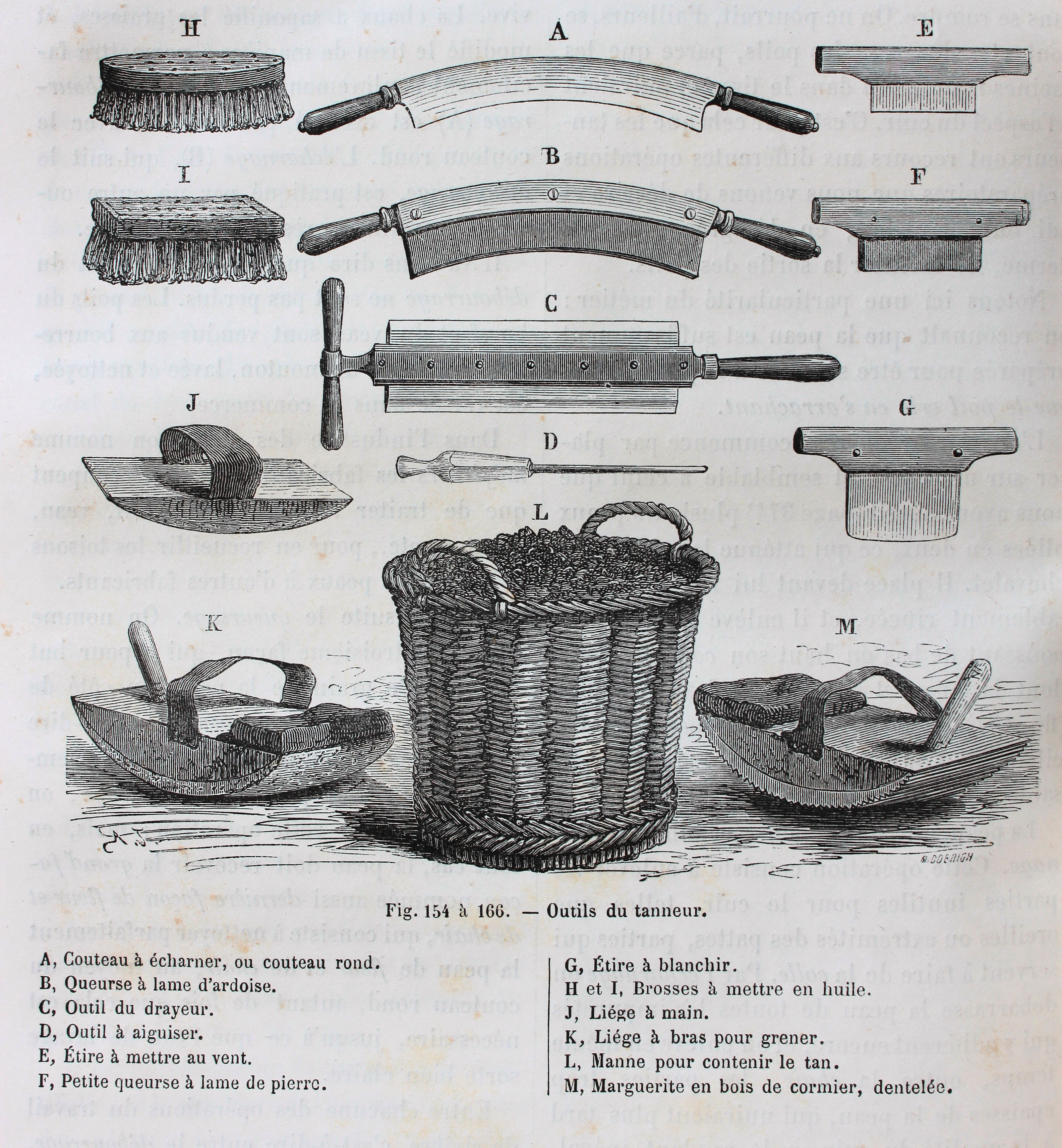 Différents outils de tanneur